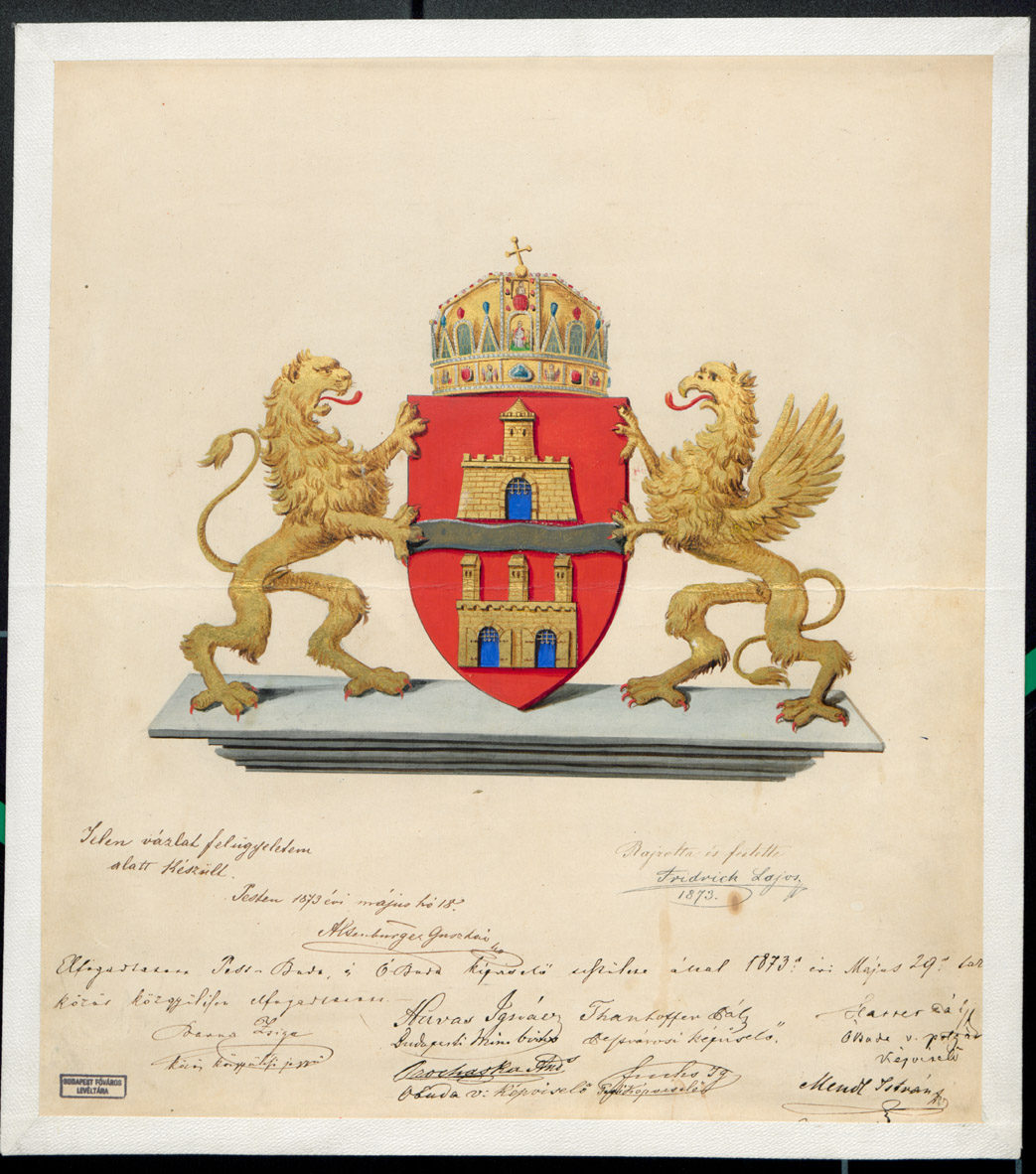 Pest. Buda és Óbuda testülete által elfogadott címer (1873. május 29.)